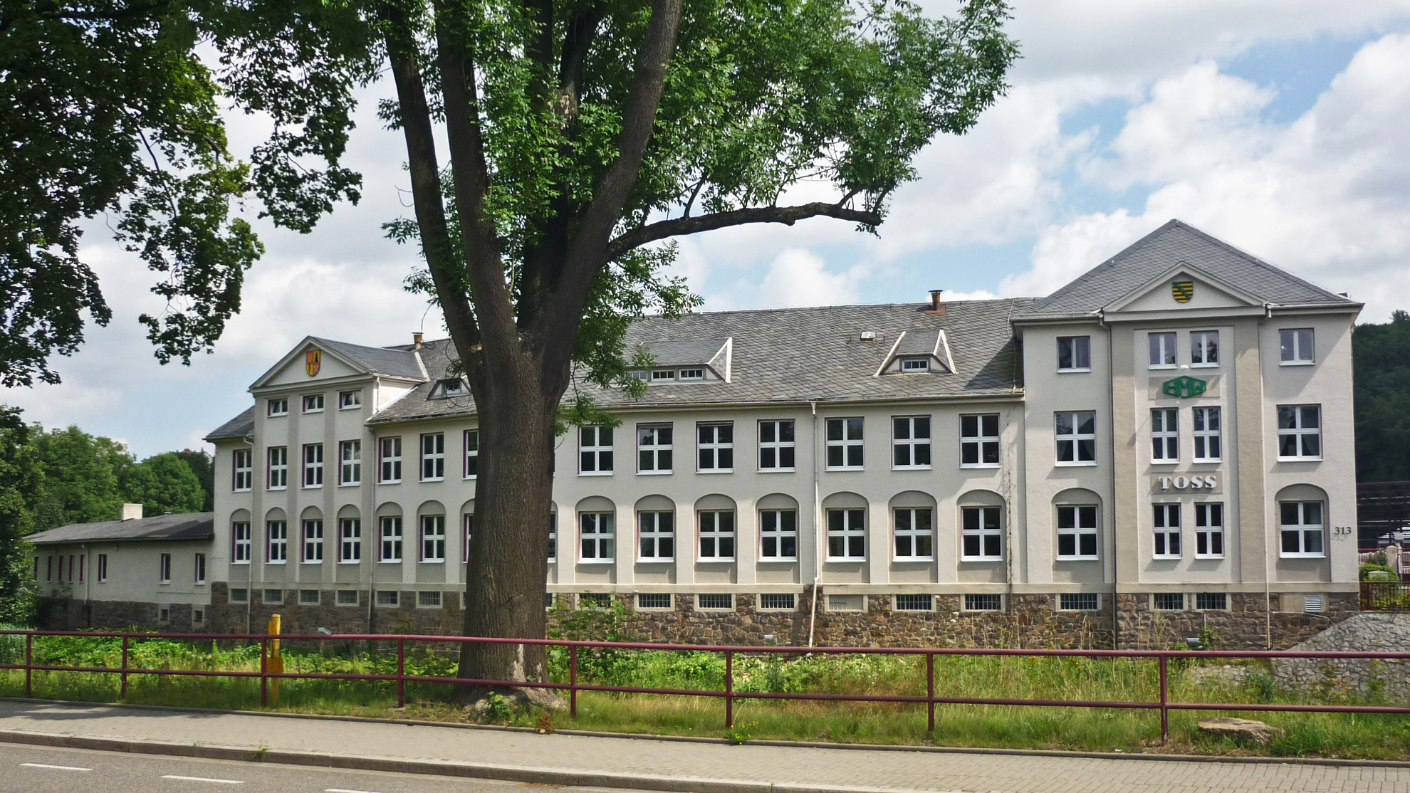 Dresdner Str. 313 in Freital-Hainsberg